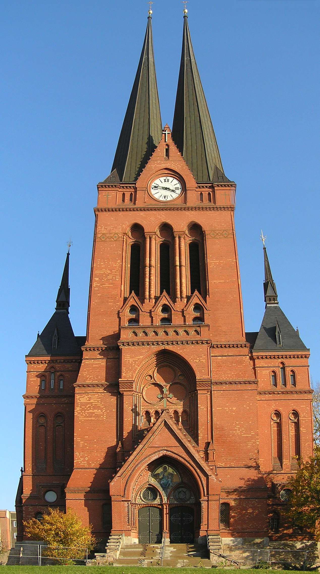 Die Markuskirche in Chemnitz (erbaut 1885)